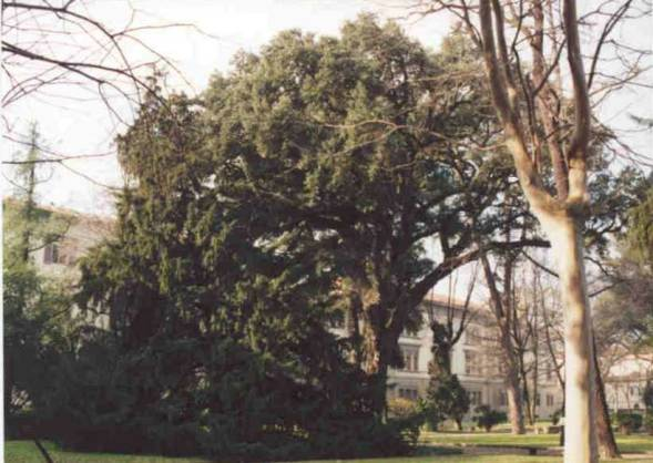 Esemplari centenari di Tasso (Taxus baccata) e sughera (Quercus suber), Giardino dei Semplici di Firenze